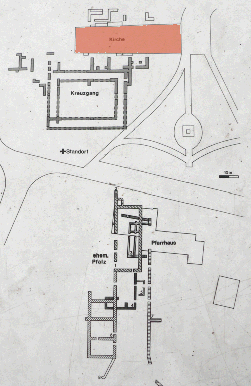 Pfalz und Klosterkirche Pöhlde, Skizze auf einem Schild neben der Anlage